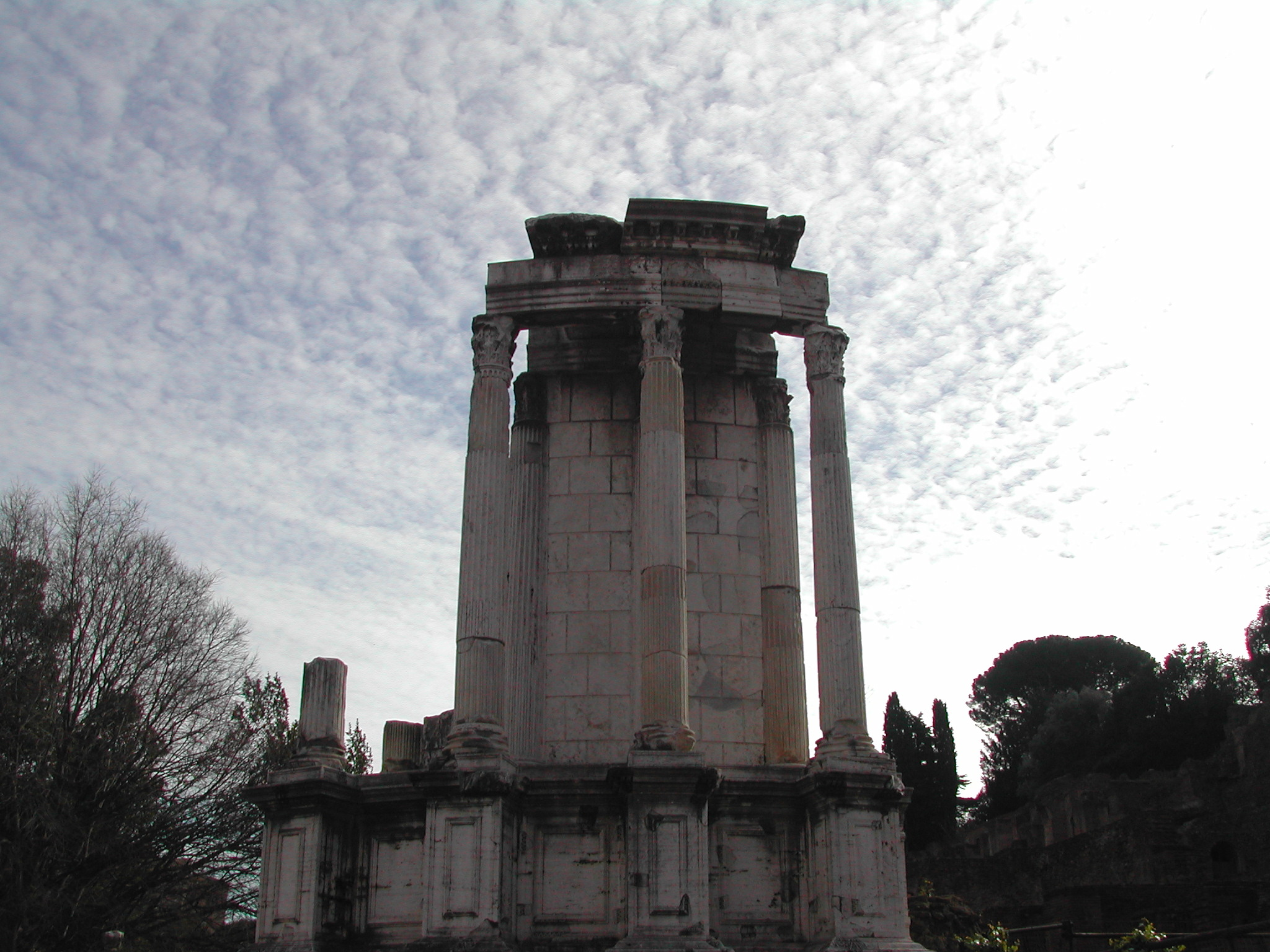 Roma, Foro romano: tempio di Vesta by Lalupa